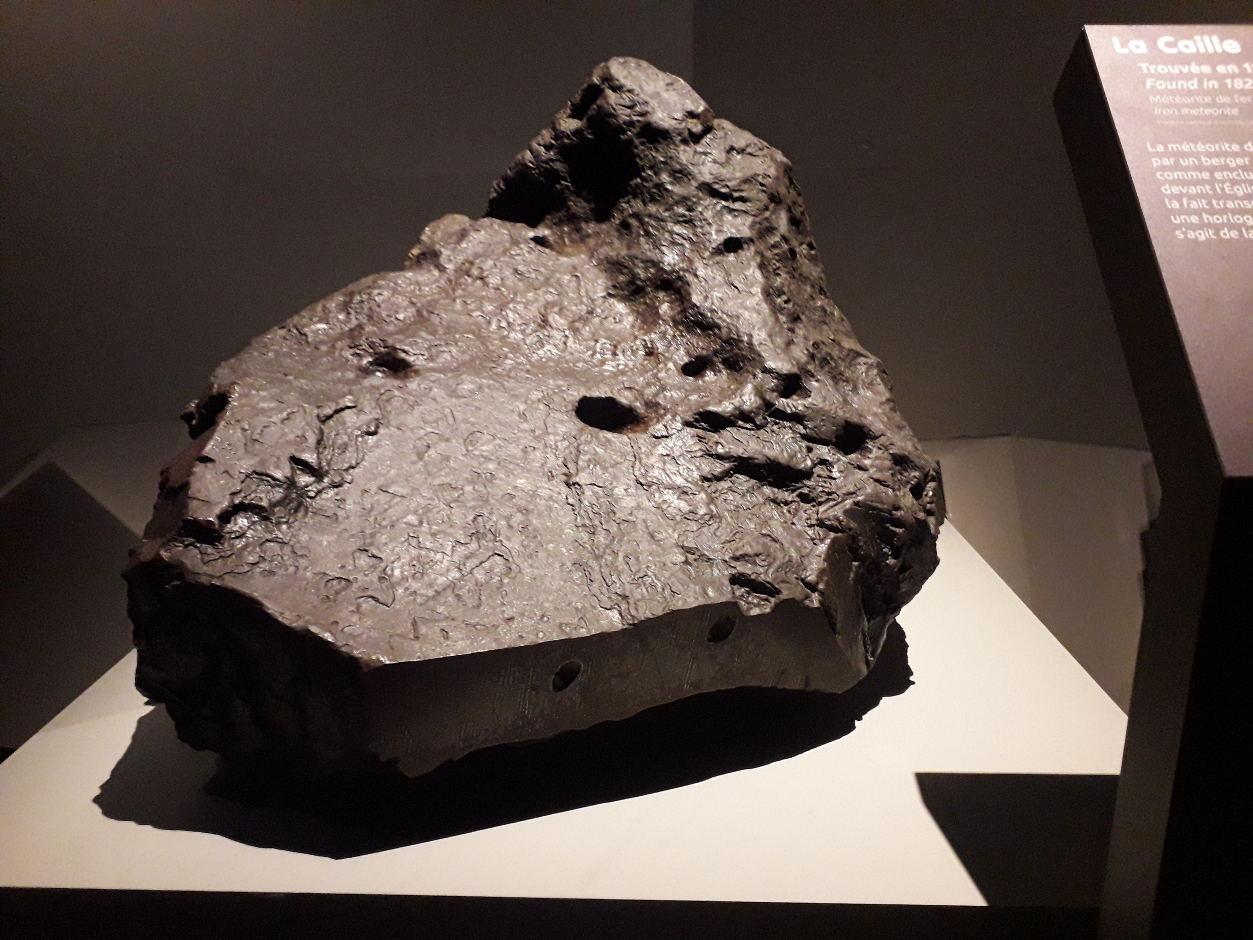 Météorite La Caille, trouvée en 1828 en France. Météorite composée de fer. La météorite de Caille a été trouvée par un berger au 17e siècle. Elle a été utilisée comme enclume, puis comme banc devant l'église du village. En 1829, le Muséum national d'histoire naturelle de Paris offre aux villageois une horloge en échange de la météorite, qui est alors transportée à Paris. La Caille pèse 626 kilos, ce qui fait d'elle actuellement (octobre 2017) la plus grosse météorite trouvée en France. Exposée à l'occasion de l'exposition "Météorites", dans le bâtiment de la grande galerie de l'Evolution, au Muséum national d'histoire naturelle de Paris (18 octobre 2017 - 10 juin 2018).